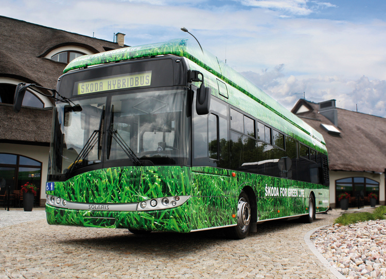 Fuente de la foto: tuttoTrasporti (Tuttobus).